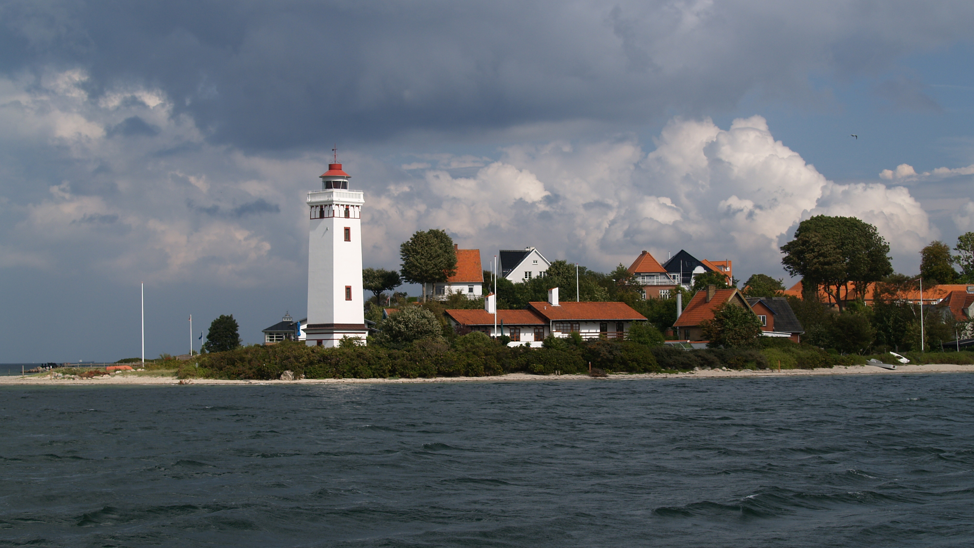 Strib Leuchtturm am nördlichen Eingang des Kleinen Belts, Dänemark